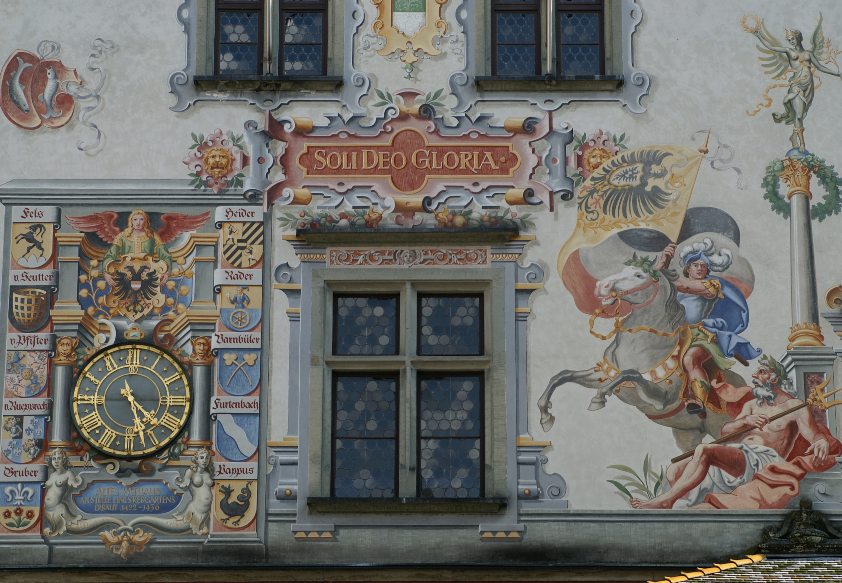 Lindau (Bodensee)